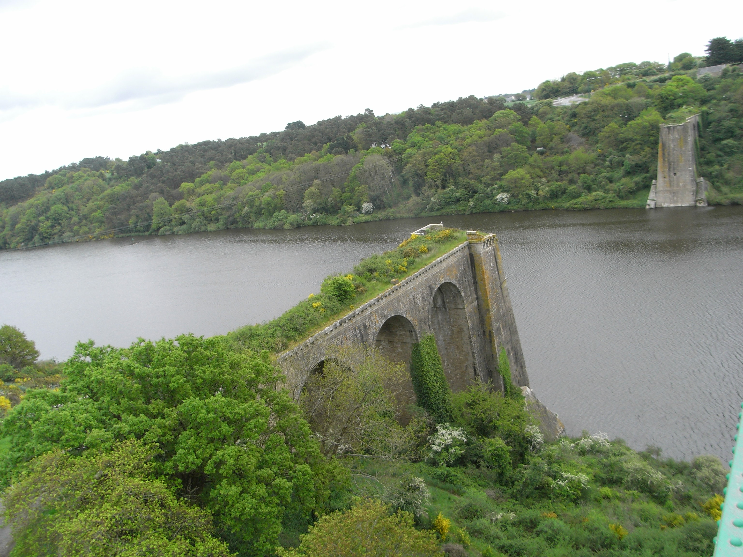 Ancien pont de La Roche-Bernard (Morbihan - Bretagne - France) sur la Vilaine.